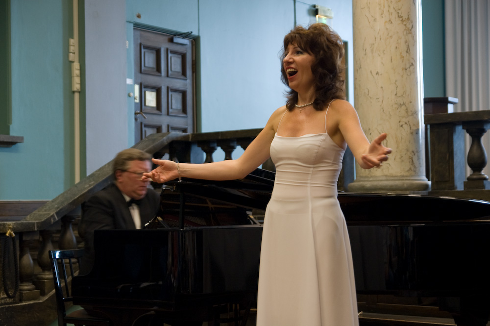 Valeria Stenkina (sopran) og Igor Uryash (klaver). Oslo Griegfestival, 2007